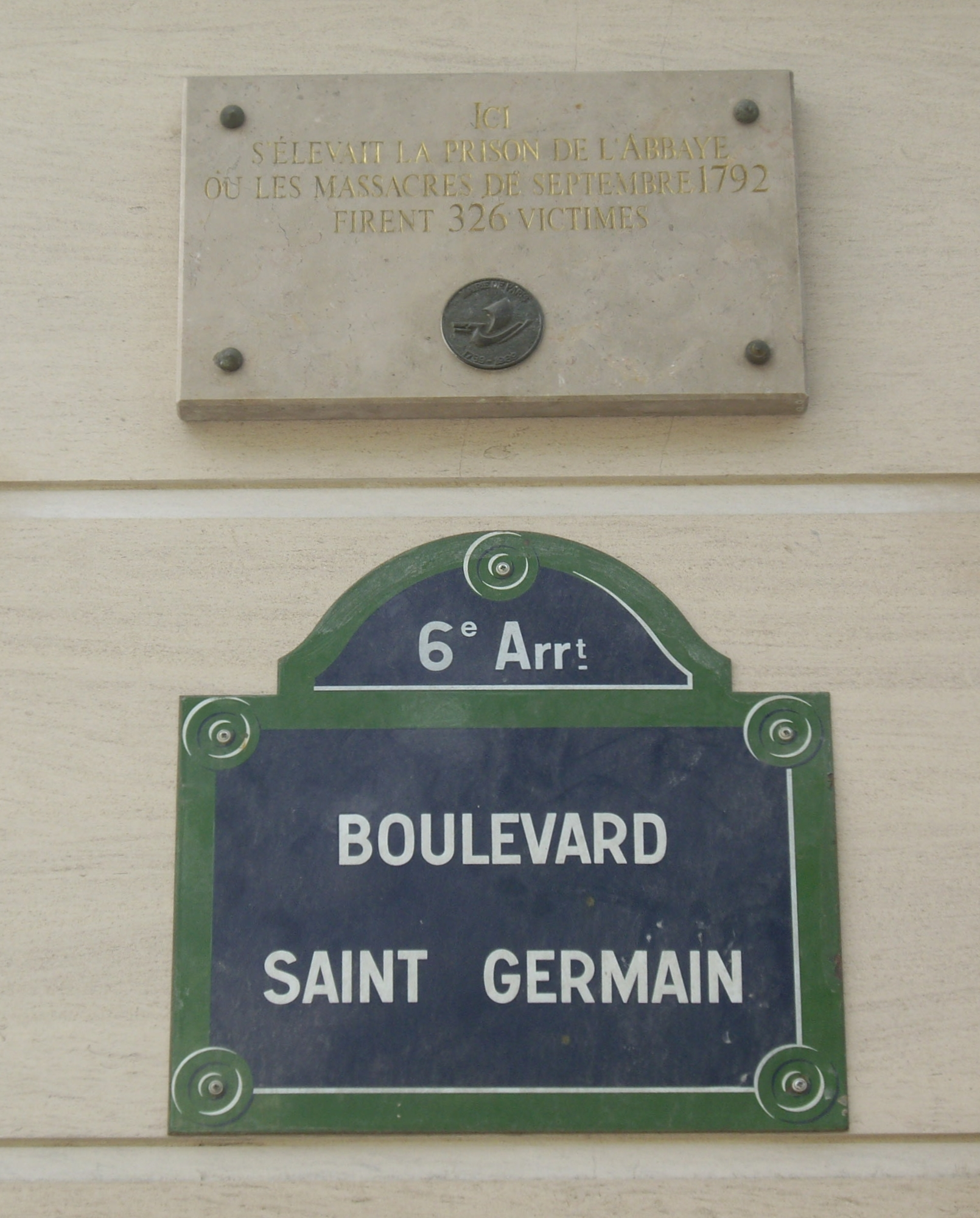 Plaque apposée au n° 133 du boulevard Saint-Germain, Paris 6e. « Ici s'élevait la prison de l'Abbaye où les massacres de septembre 1792 firent 326 victimes. »